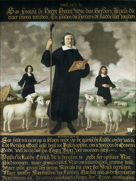 Clemens Bijleveld, Luthers predikant te Gouda als "de Goede Herder" door Jan Ariens Duif. Na restauratie is vastgesteld dat de figuren links en rechts van hem twee diakenen zijn en niet zijn opvolgers, zijn neef Clemens Bijleveld II en zijn achterneef Clemens Bijleveld III, wat tot dusver was aangenomen (bron De Schatkamer, 2013 jaargang 27, aflevering 3, blz. 70)